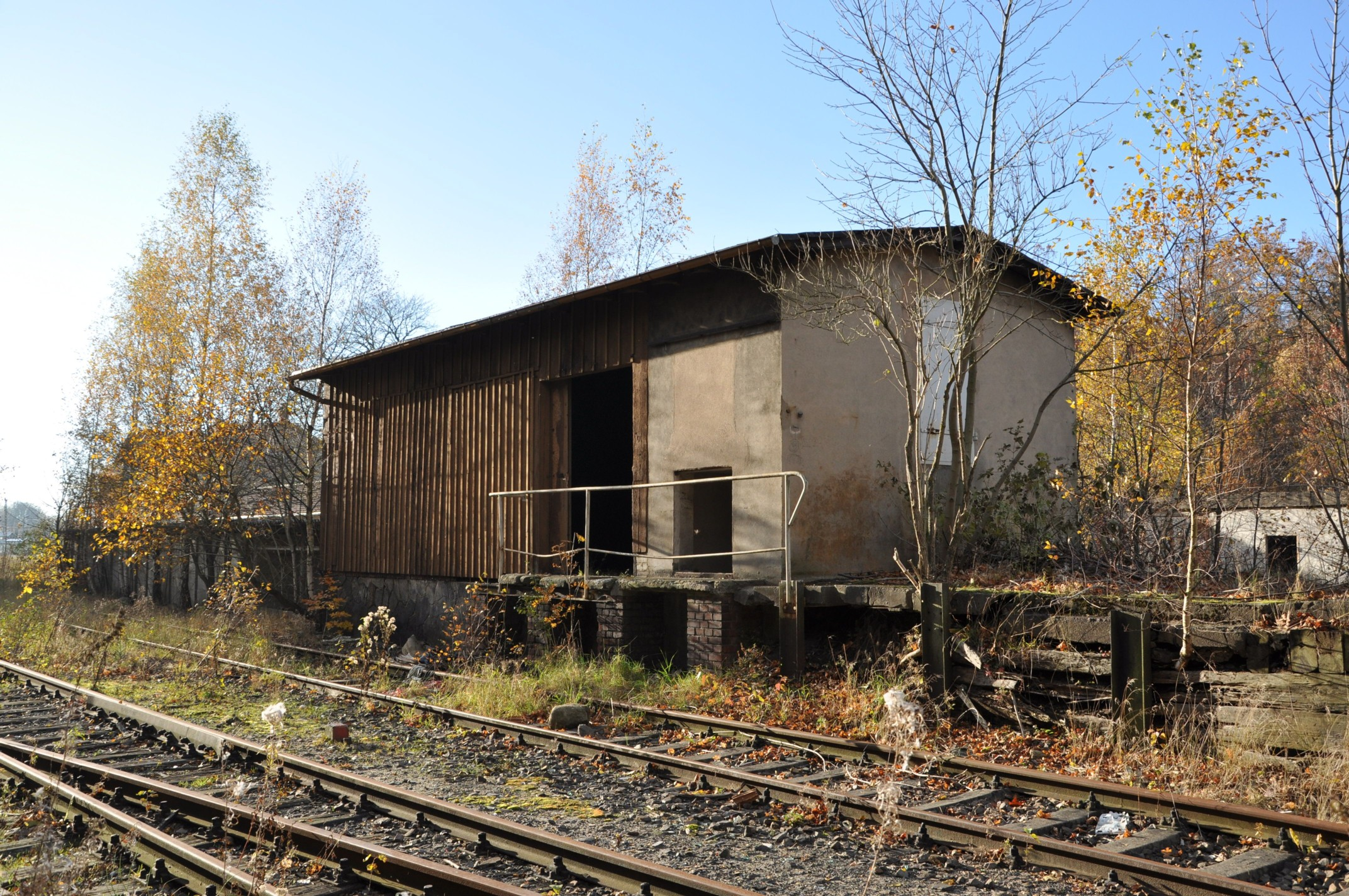 ehemaliger Kohleschuppen der Schmalspurbahn am Bahnhof Klingenberg-Colmnitz